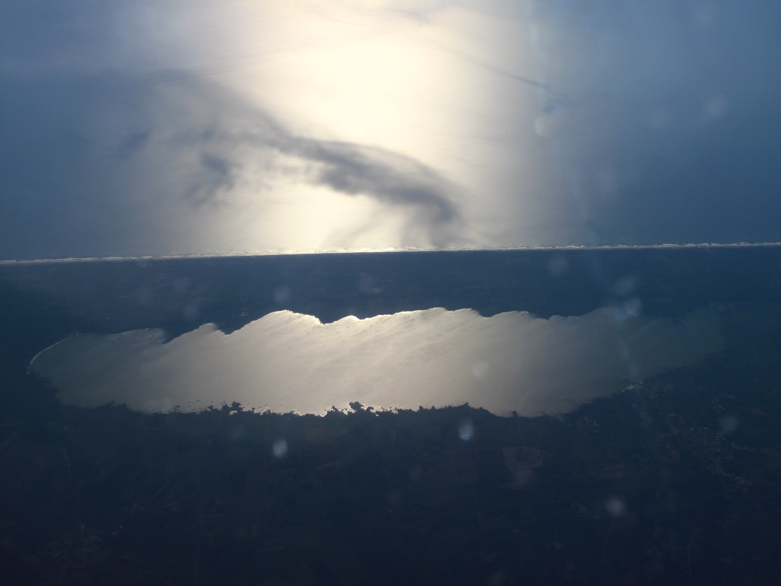 Lac de Hourtin et de Carcans, vu d'avion (Gironde, France).